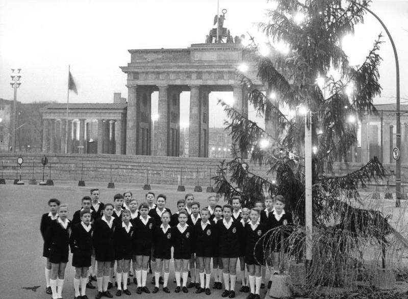 Berlin, Schöneberger Sängerknaben 19.12.1961 West-Berlin Die Schöneberger Sängerknaben singen Weihnachtslieder vor der Mauer am Brandenburger Tor [Berlin.- Schöneberger Sängerknaben neben beleuchtetem Weihnachtsbaum vor dem Brandenburger Tor]